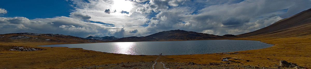 View Large On Black